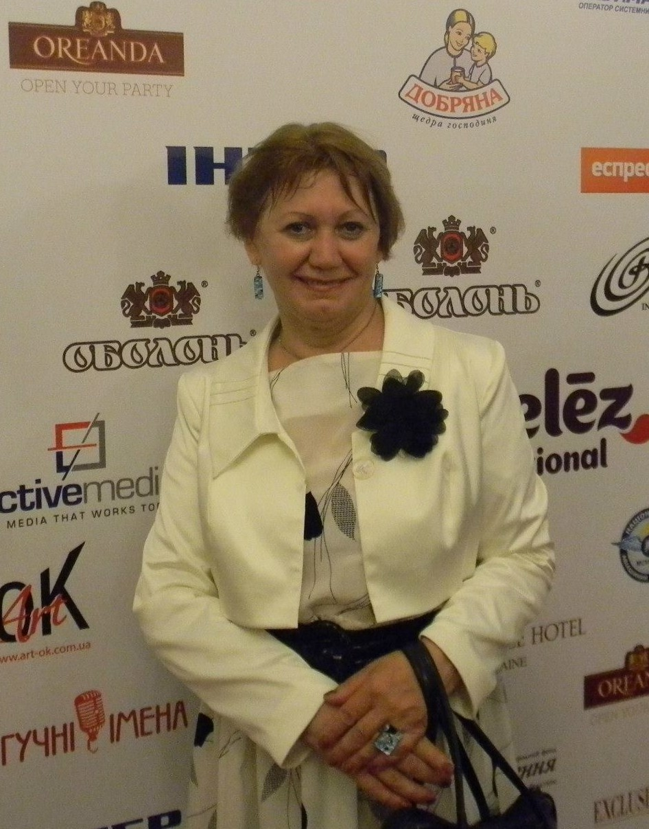 Чечель Людмила Василівна